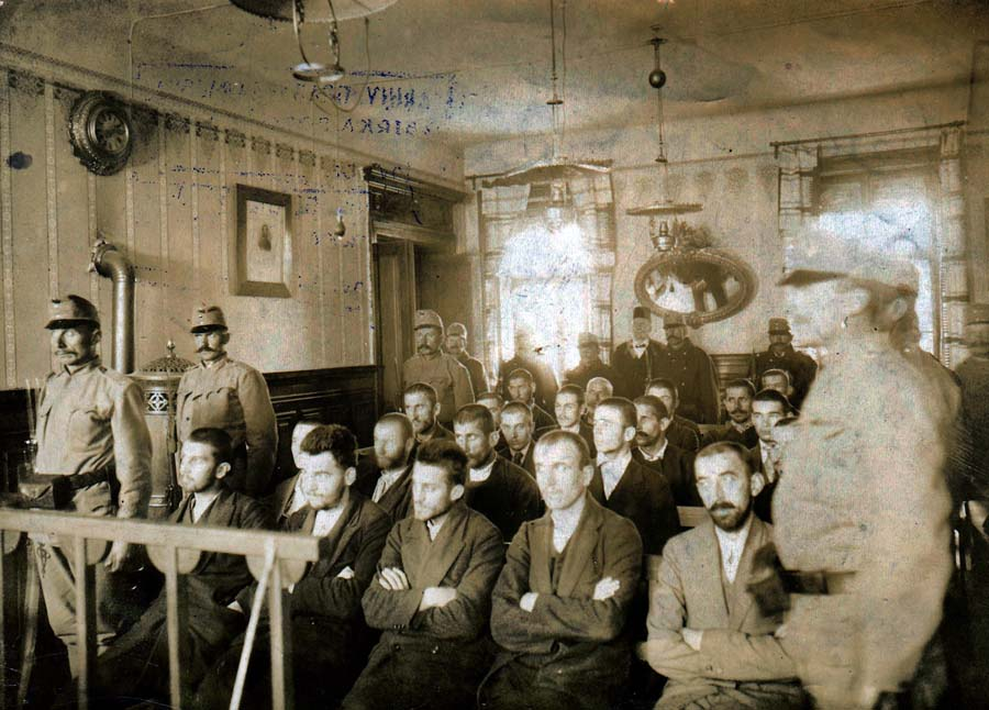 Sarajevo trial, 1914.